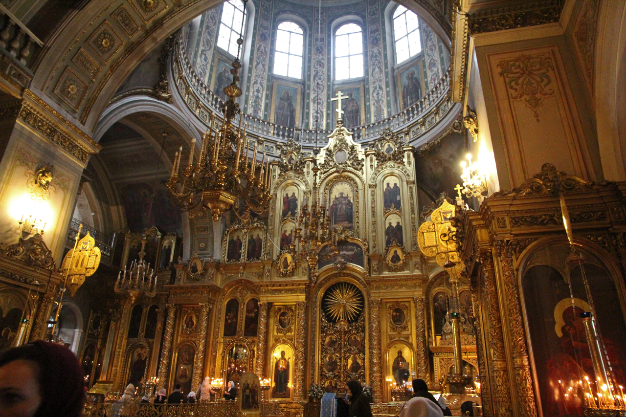 Собор Богоявленский в Елохове (Москва и Московская область, Москва, Спартаковская улица, 15)